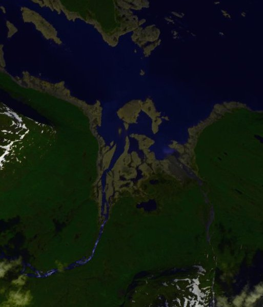 Image satellite des bouches de la Stora Lulevatten, sur le grand lac Akkajaure, non loin du parc national de Sarek, en Botnie du Nord (Norbotten), Suède.